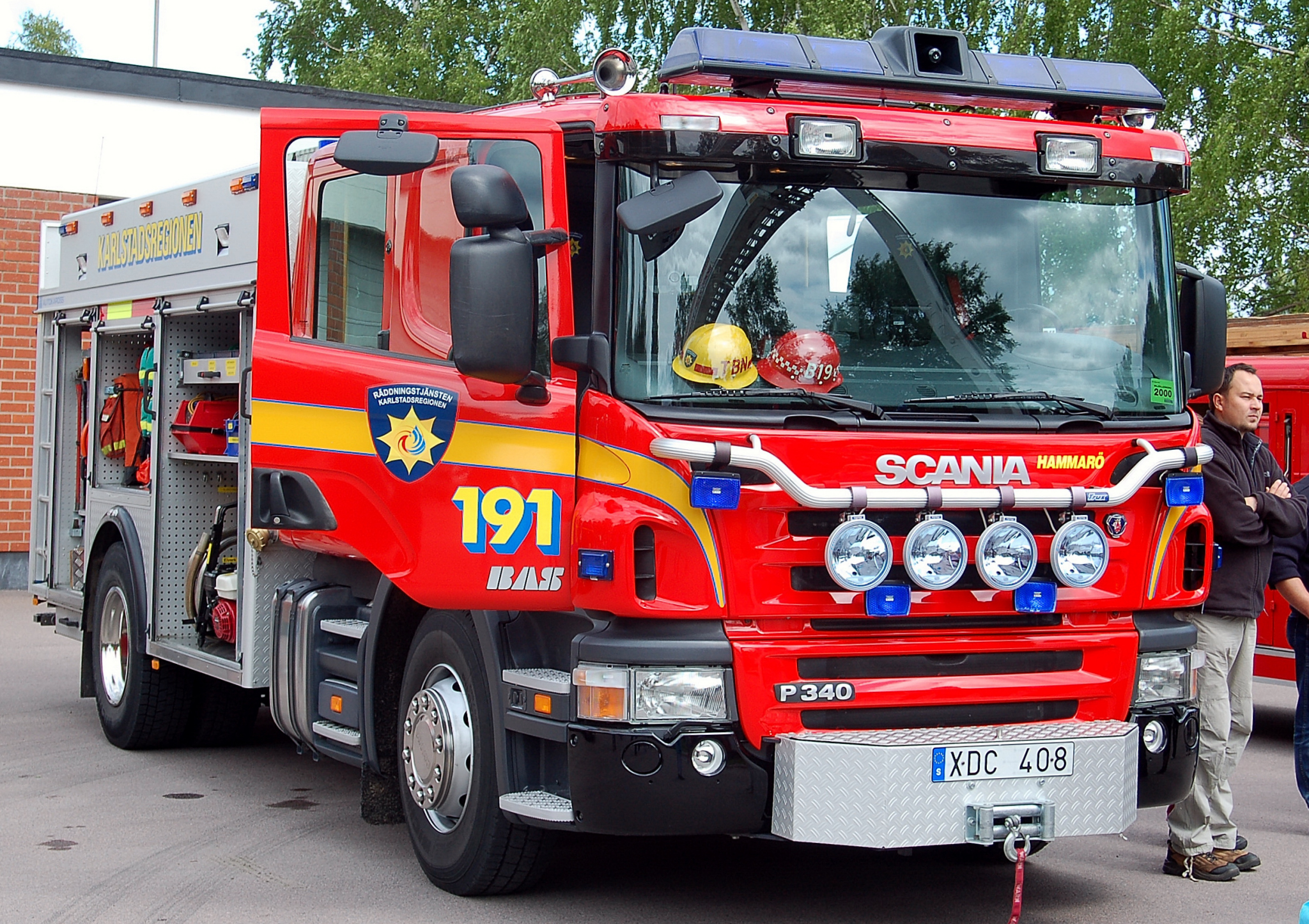 Scania brandbil fotograferad utanför Hammarö räddningstjänst i Skoghall, Värmland